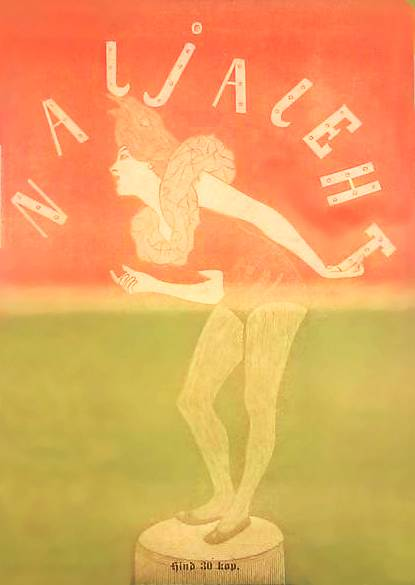 Naljaleht, esikaas